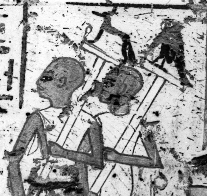 Horusgeleit als Grabdarstellung aus dem Grab des Hori (TT 259), Ende der 20. Dynastie.